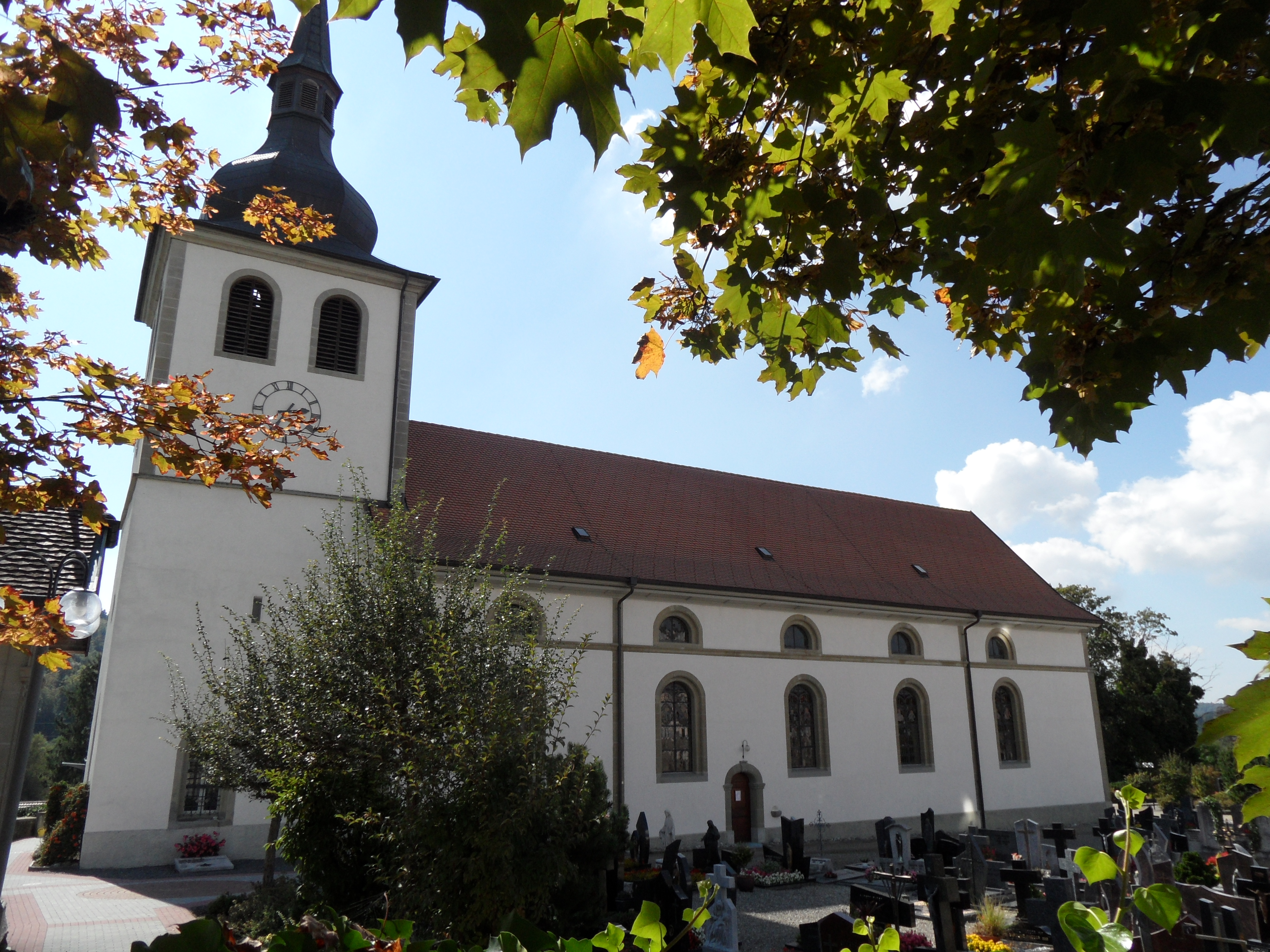 Eglise paroissiale de Marly, canton de Fribourg en Suisse.